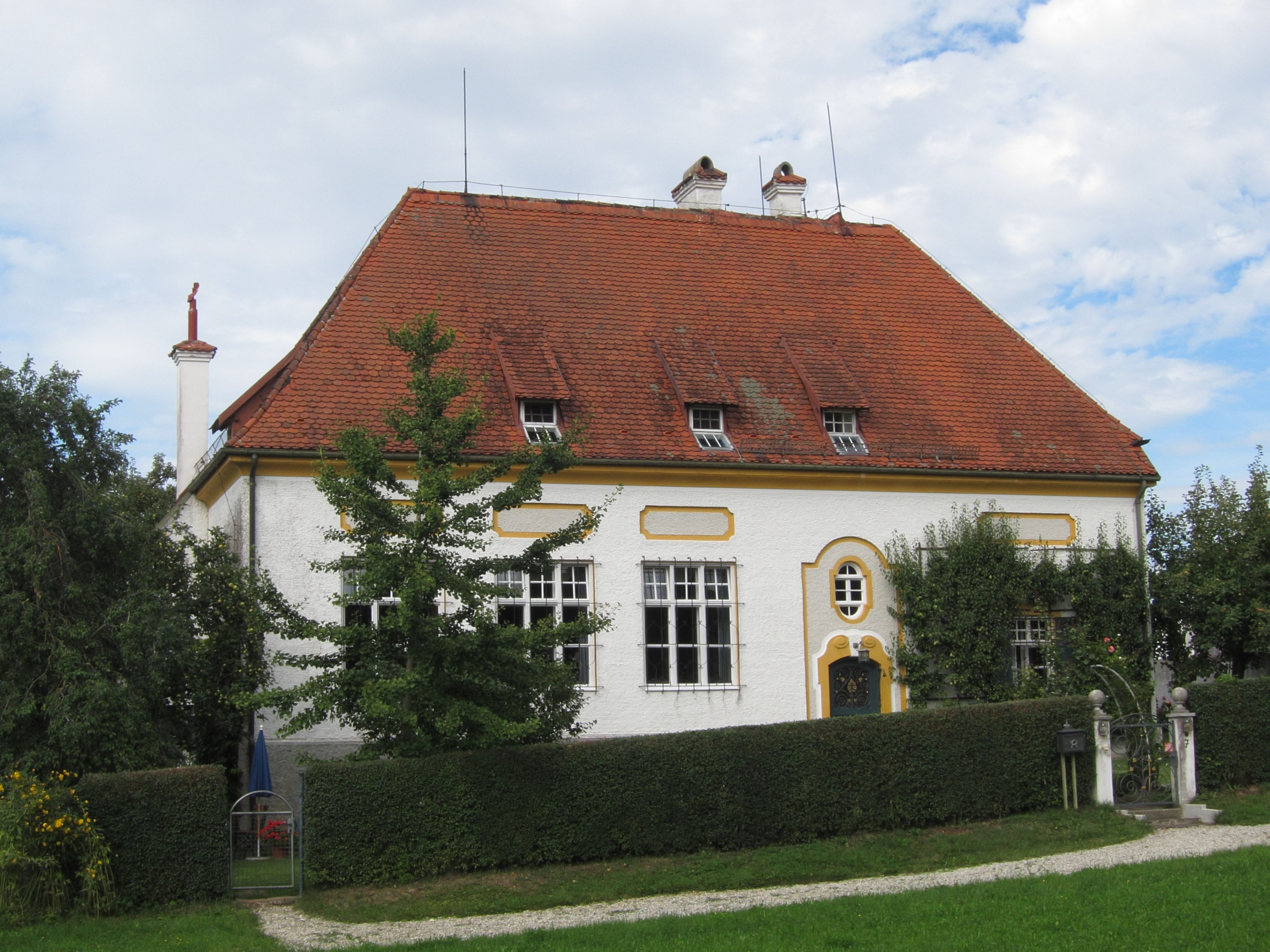 Rappoltskirchen 7; ehem. Schulhaus, eingeschossiges Walmdachhaus in neubarocken Formen mit Jugendstilmotiven, von Joh. Bapt. Schott, 1904; mit Ausstattung; Einfriedung, massiver Mauerzug mit Einfahrtspfosten, gleichzeitig.